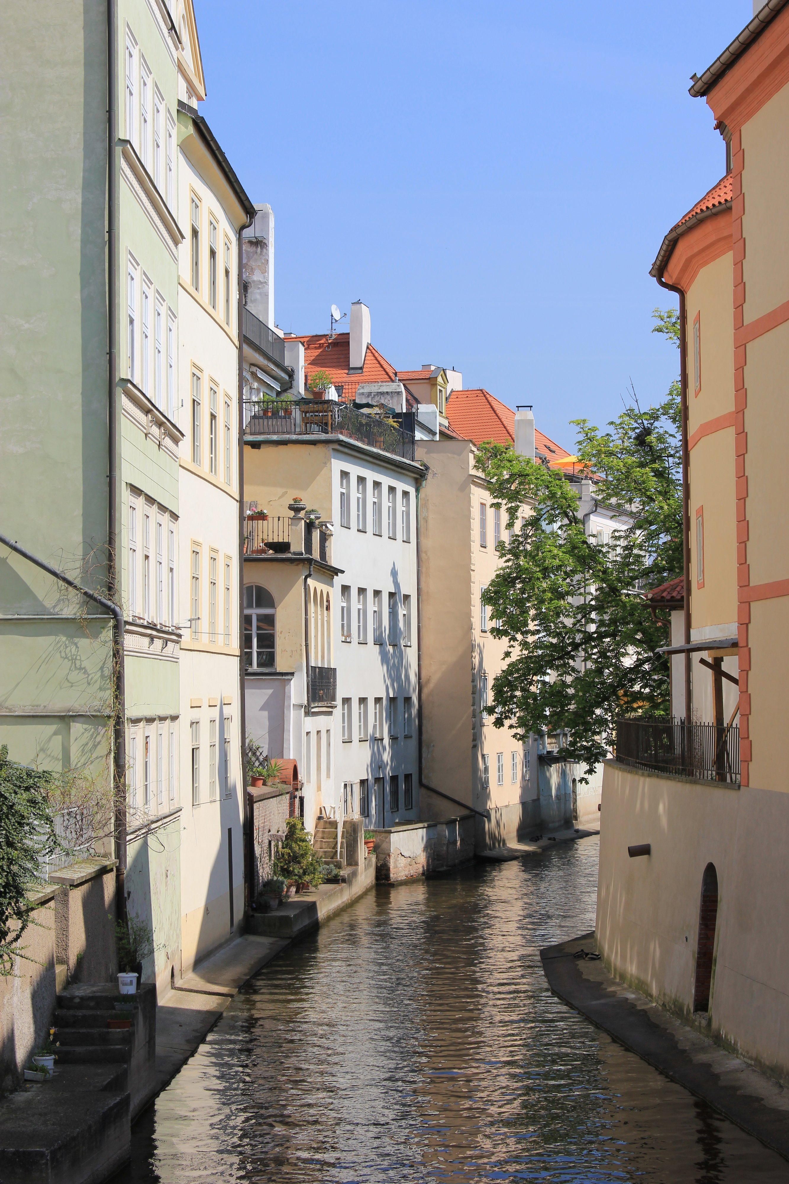 Hornjoserbsce: Rěčka "Čertovka" na Małej Stronje w Praze.